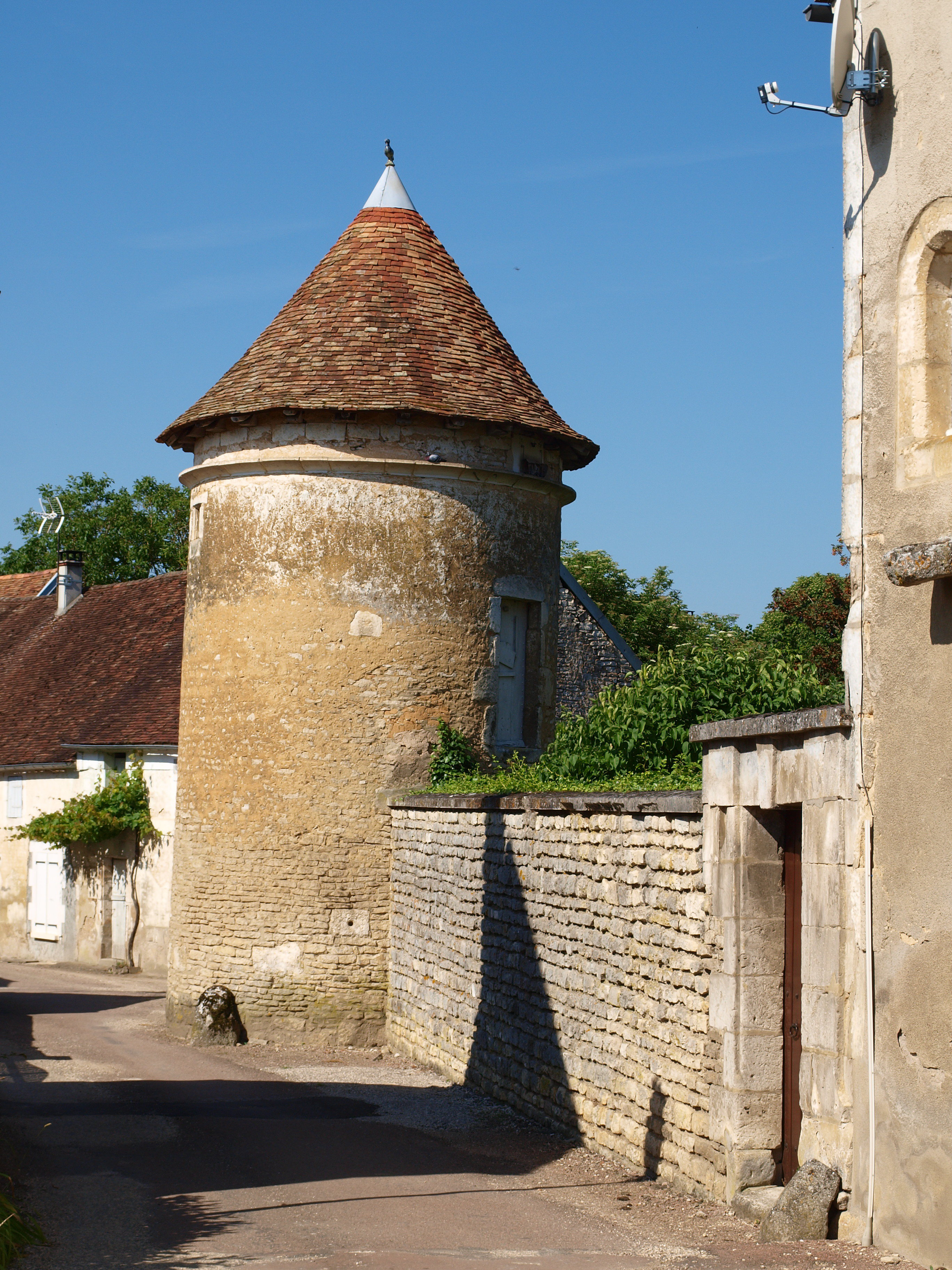 Thury (Yonne, France) , un pigeonnier